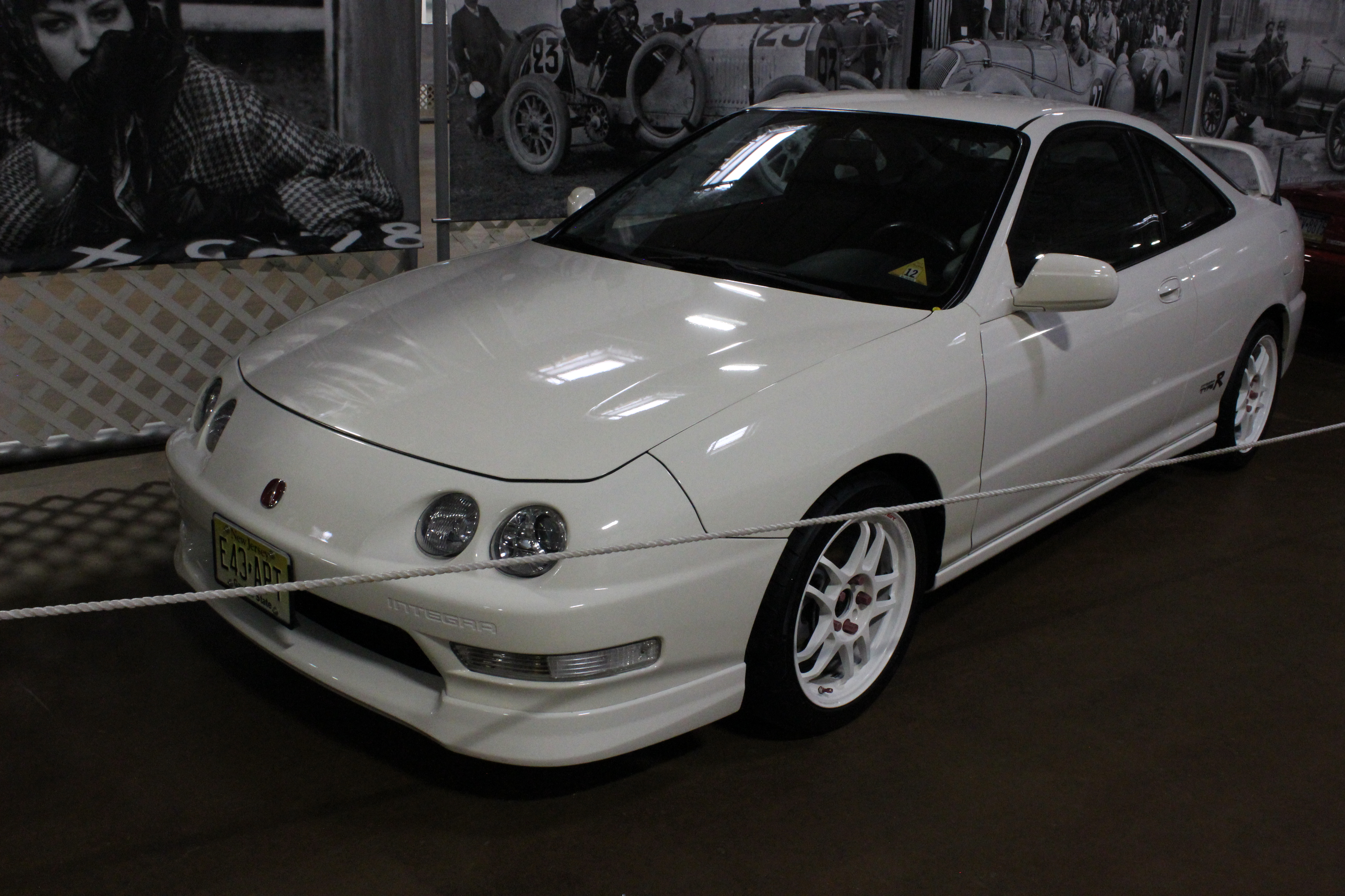 Acura Integra Type R